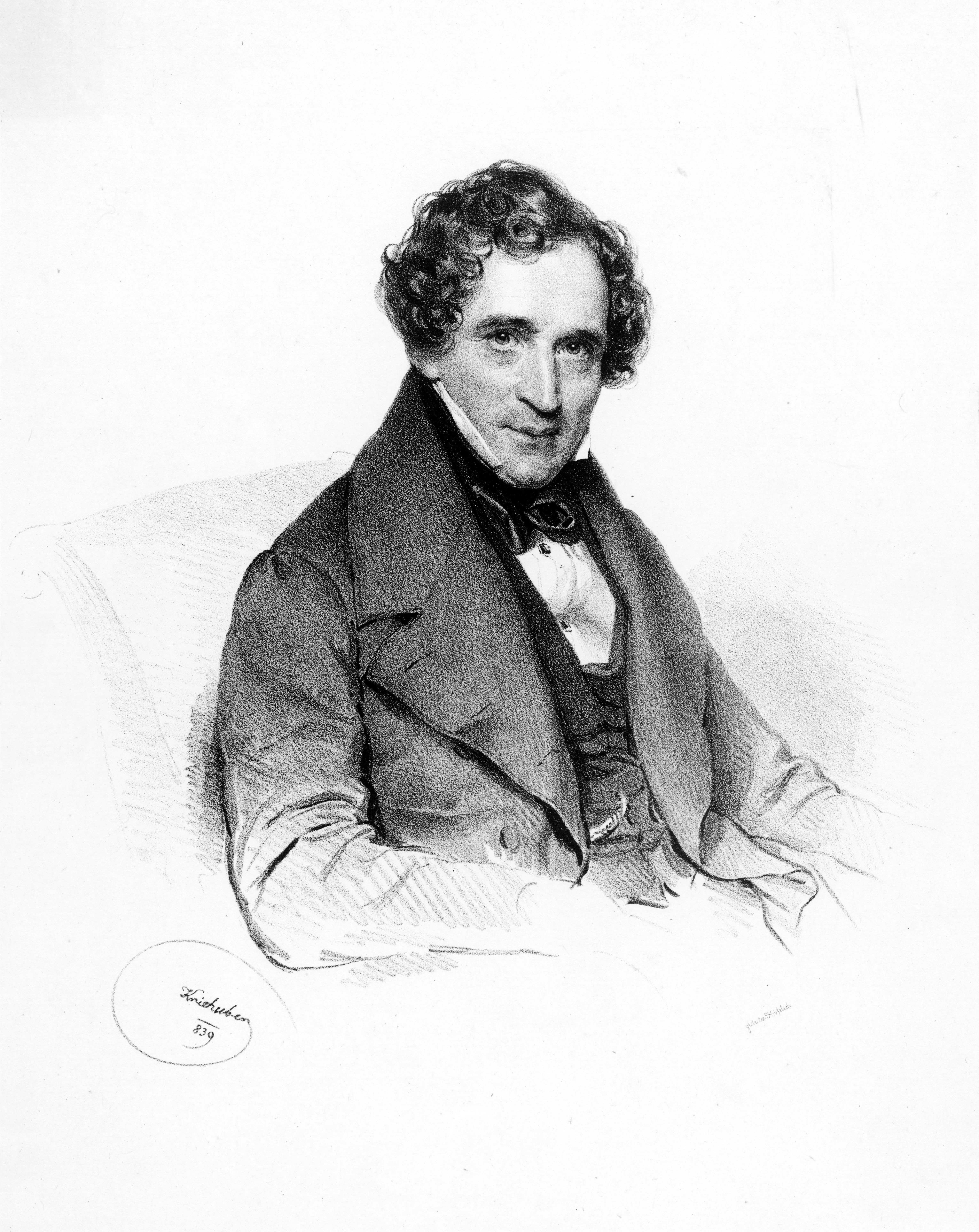 Pietro Mechetti (1775-1850), Kunst- und Musikverleger in Wien. Lithographie von Josef Kriehuber, 1839